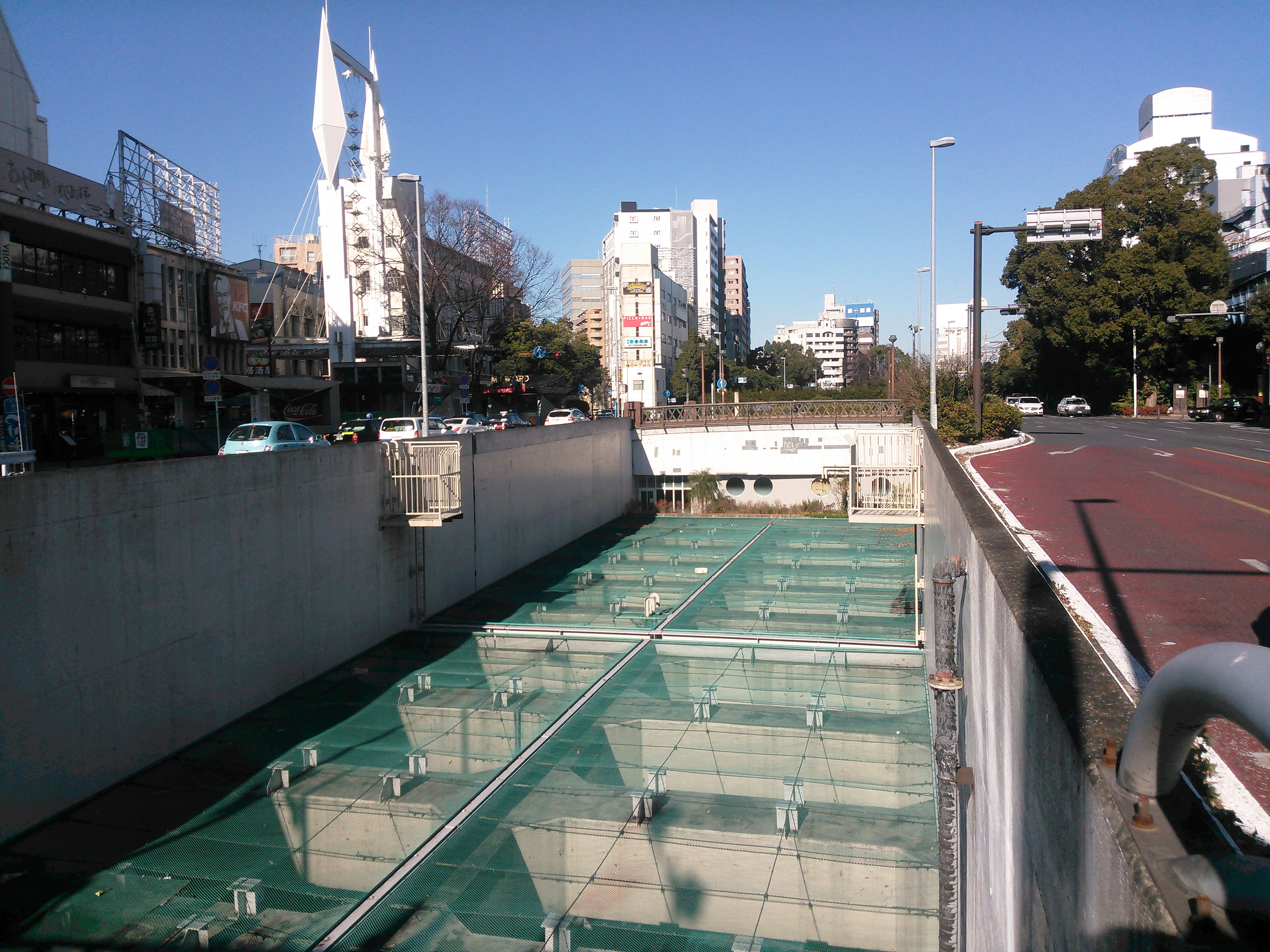 横浜市中区、吉田橋。下を通るのは首都高速横羽線